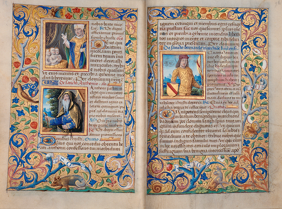 Doppelseite aus dem Stundenbuch Christophs I., um 1500 Manuscript in the Badische Landesbibliothek, Karlsruhe Codex Durlach 1, Bl. 95v-96r